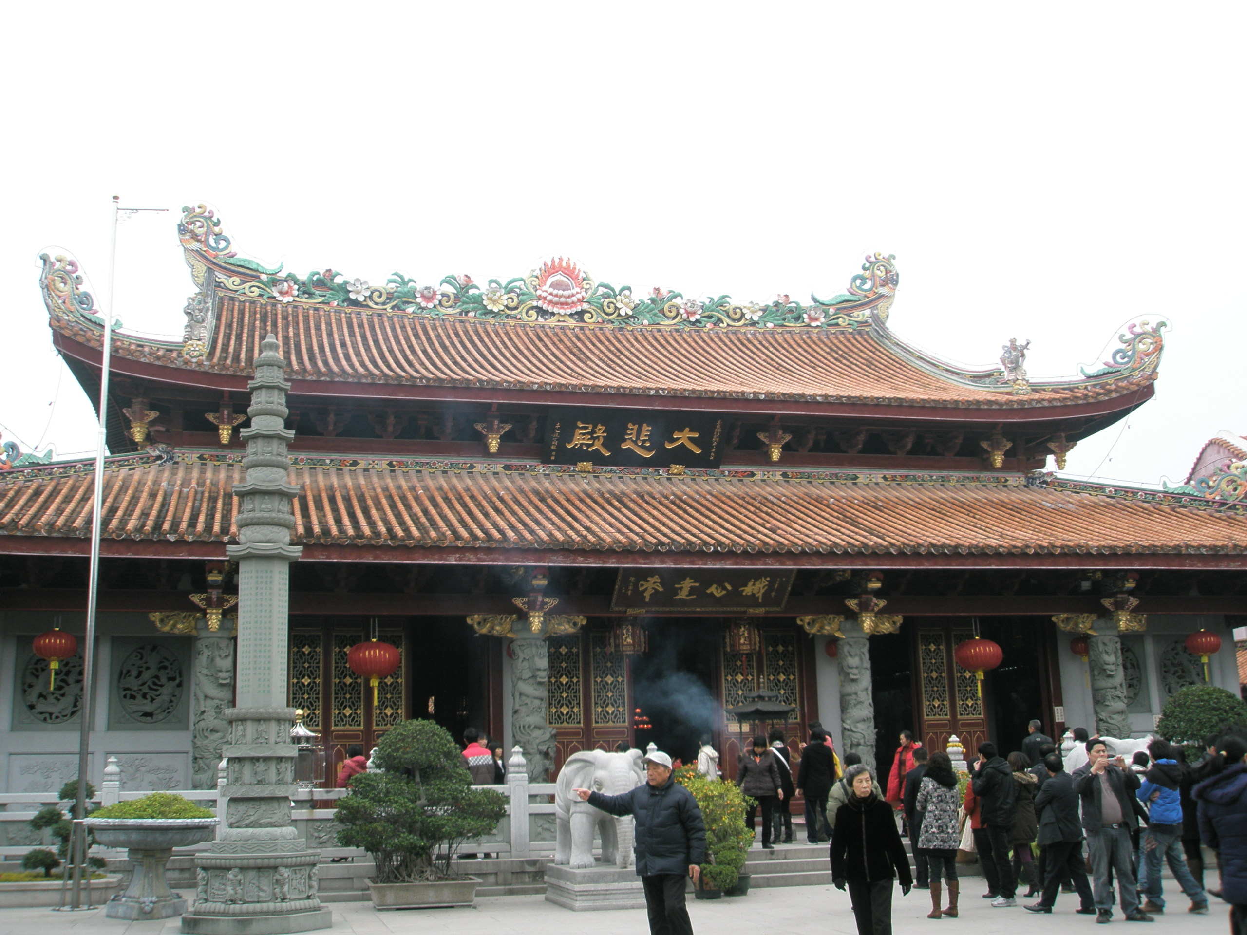 潮州开元寺大悲殿